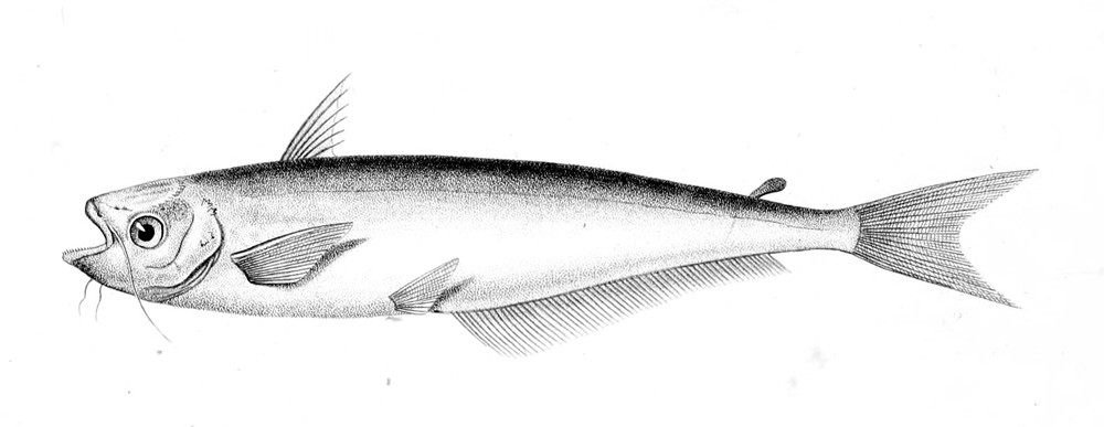 Schilbe mystus